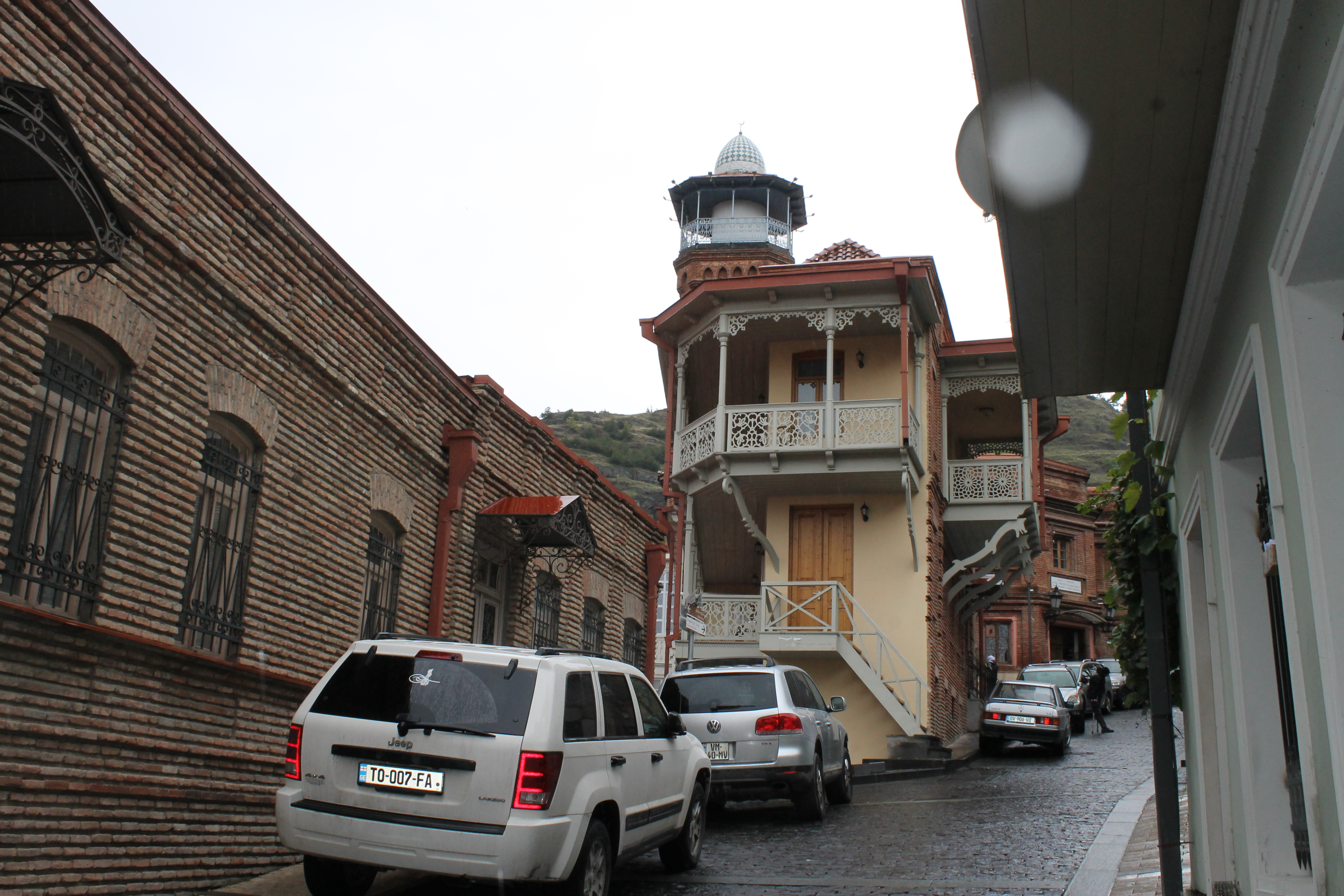 Тбилиси. Ботаническая улица